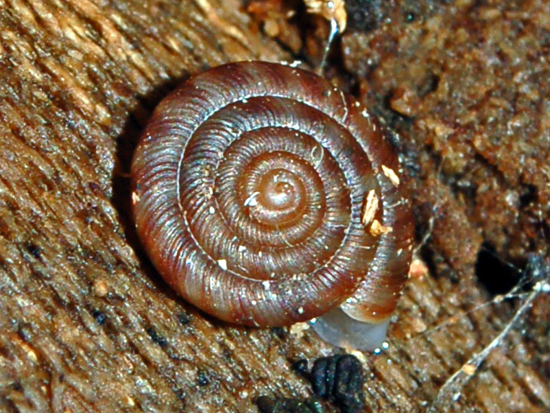 Discidae - "Discus rotundatus" - Acquasanta, Genova, Italy